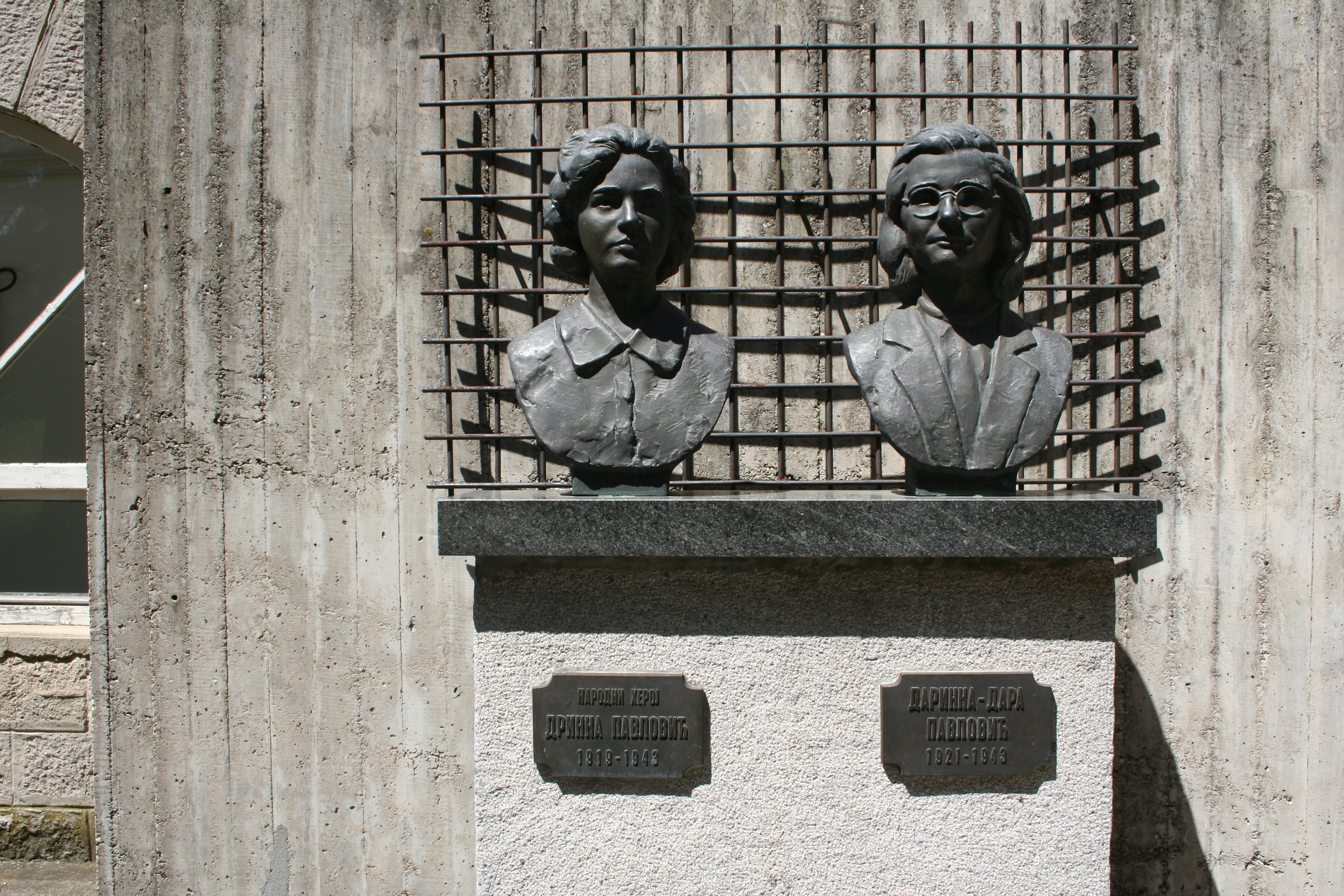 Spomenik sestrama Pavlović u dvorištu škole